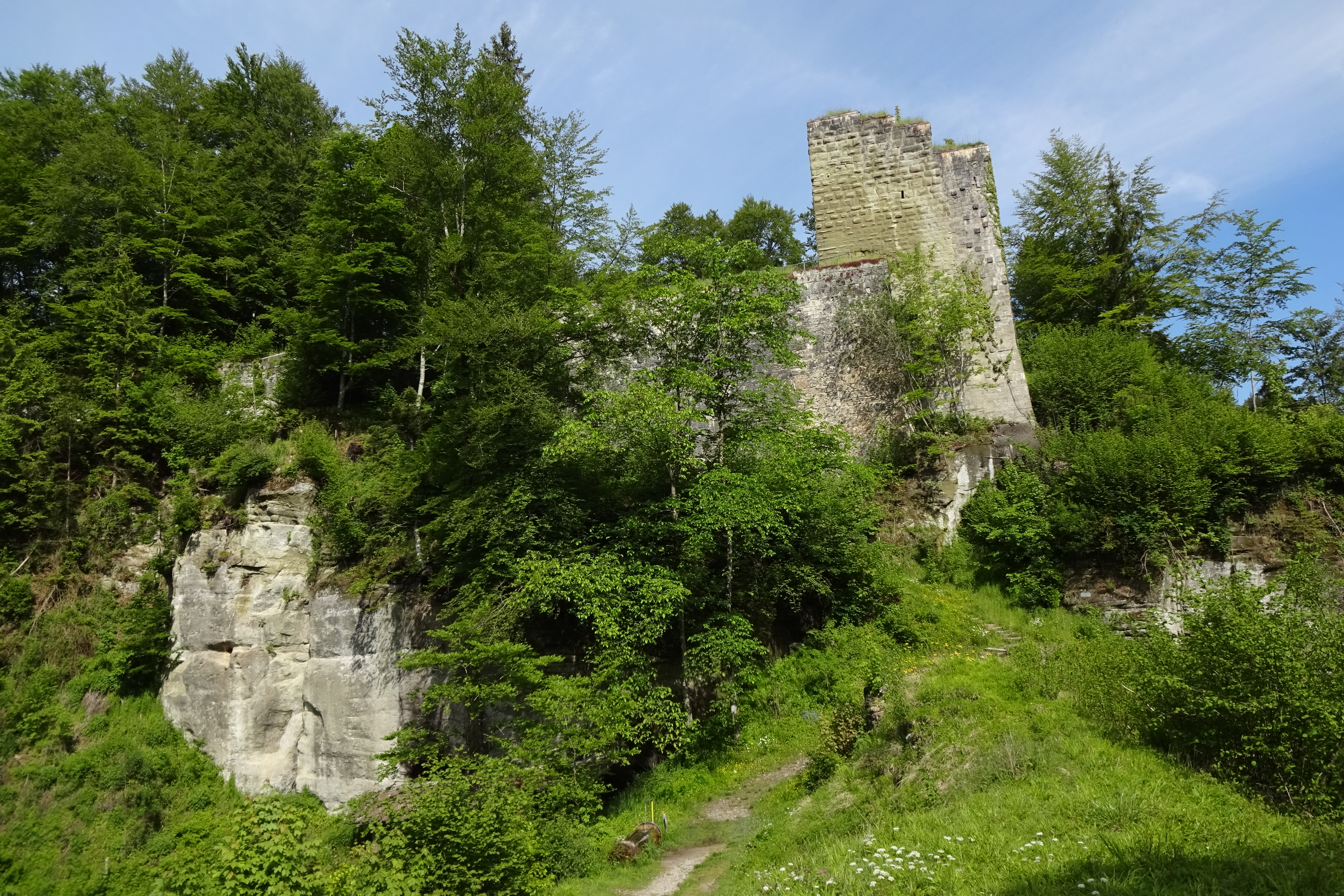 Naturpark Gantrisch (Nr. 1011P) – Grasburg (Sensegraben, Schwarzenburg BE) Vorderburg : Gesamtanlage mit Wohnturm von Südosten